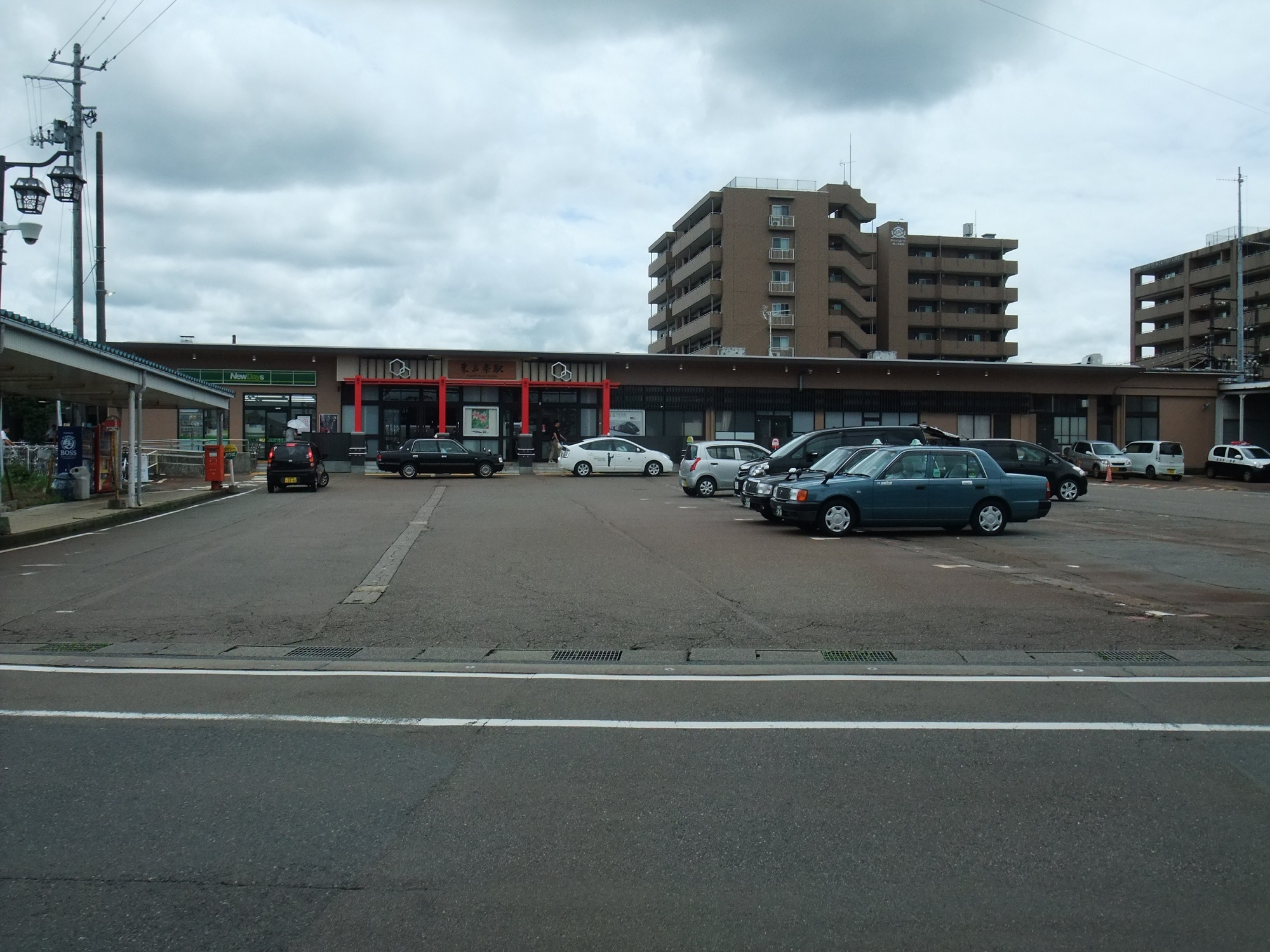 信越本線東三条駅